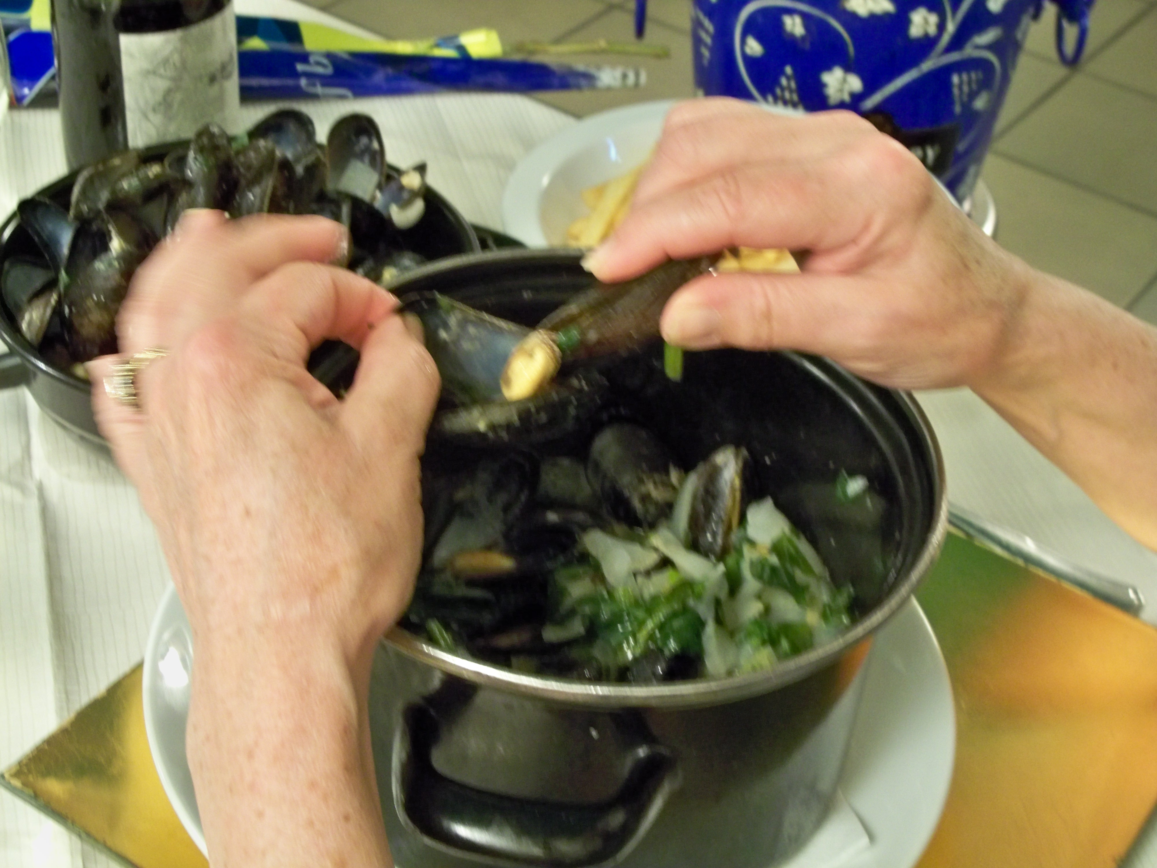 plat de moule mangé à la main